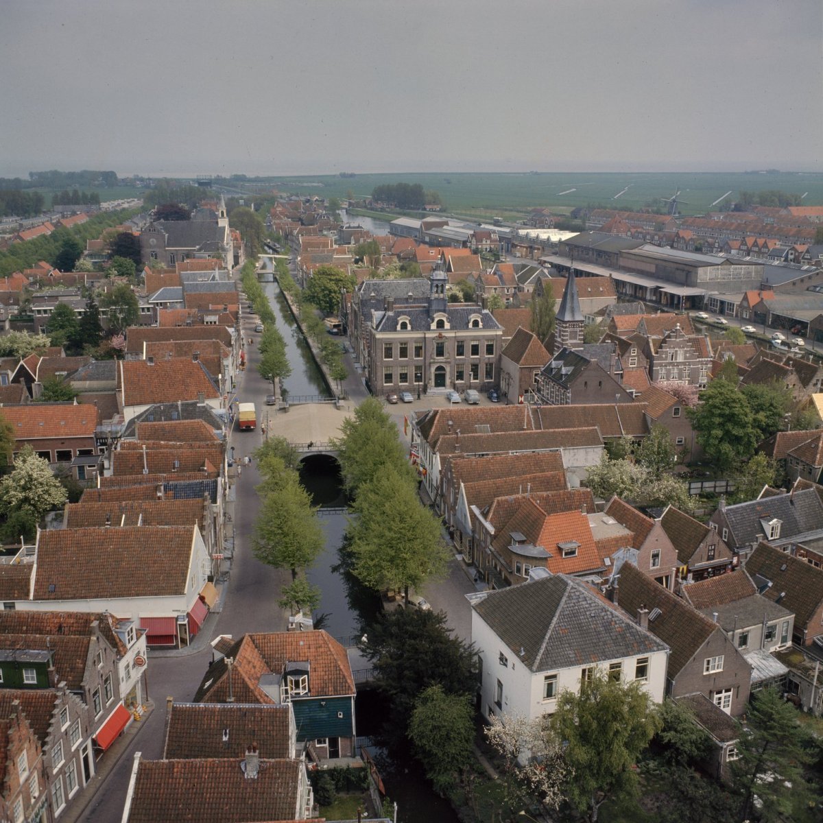 Luchtfoto/ Stadsgezicht: Overzicht vanaf de Speeltoren